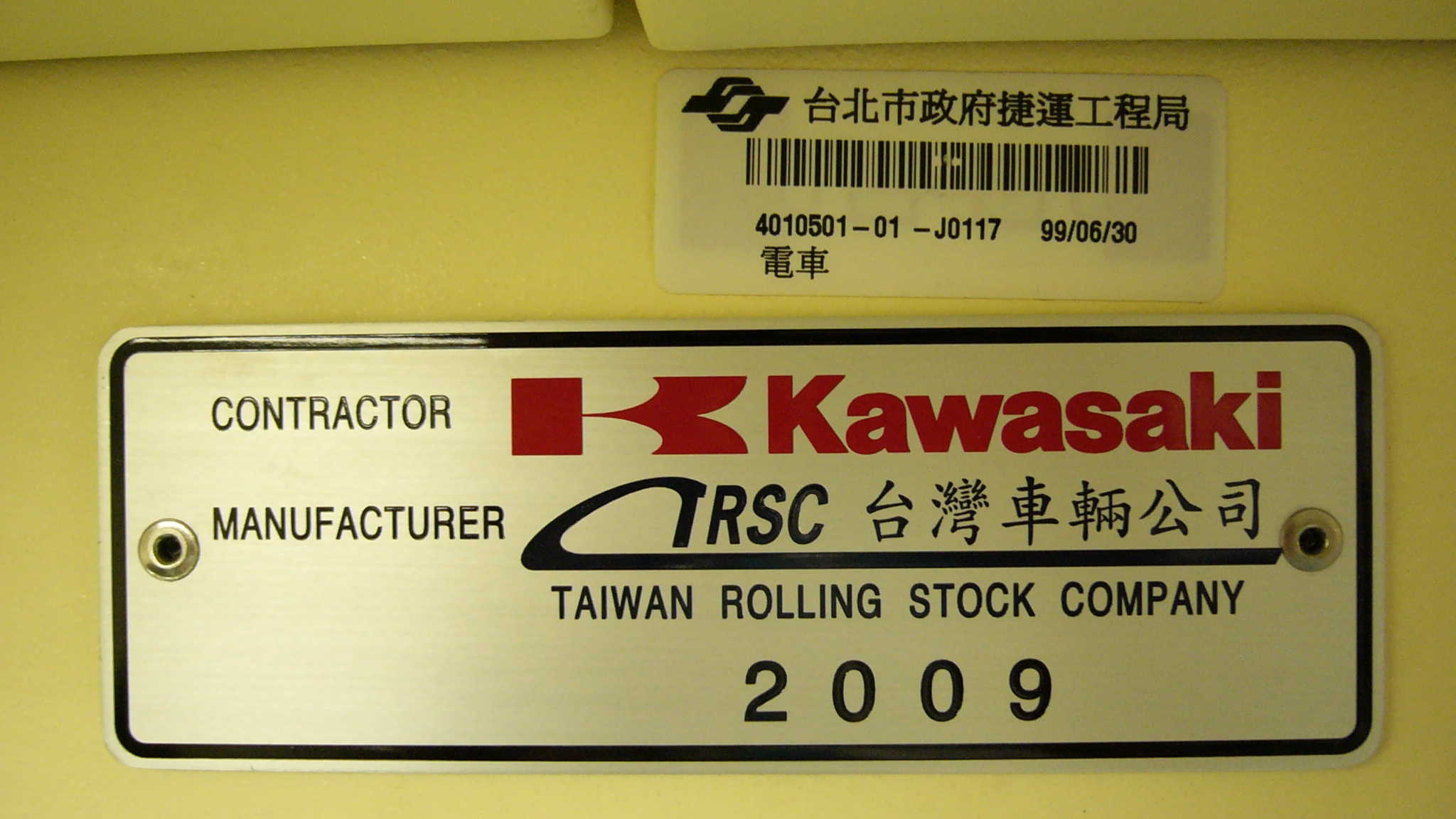 台北捷運371型電聯車內的台北市政府捷運工程局財產條碼標籤與川崎重工及台灣車輛銘板